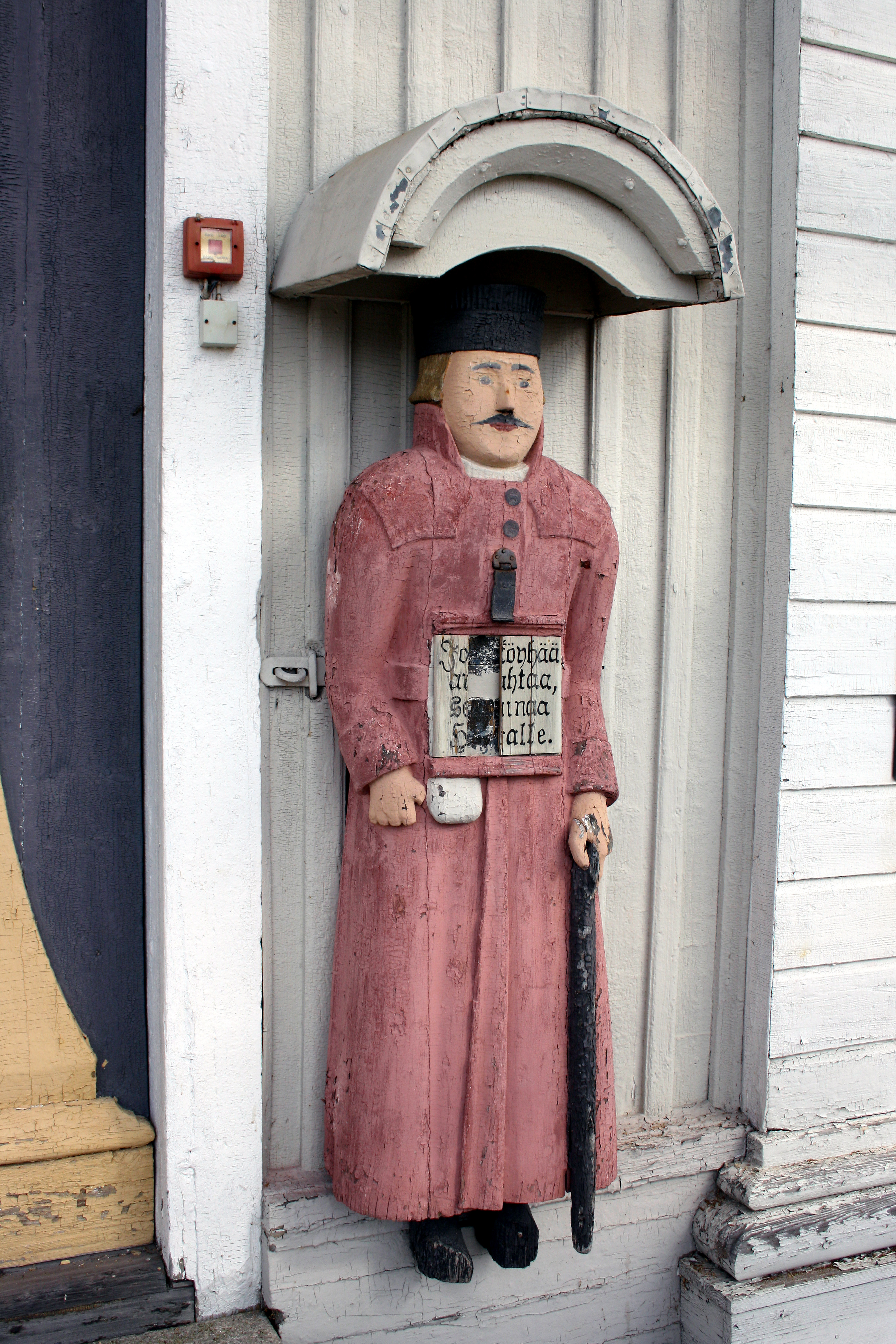 Kälviän kirkon vaivaisukko.